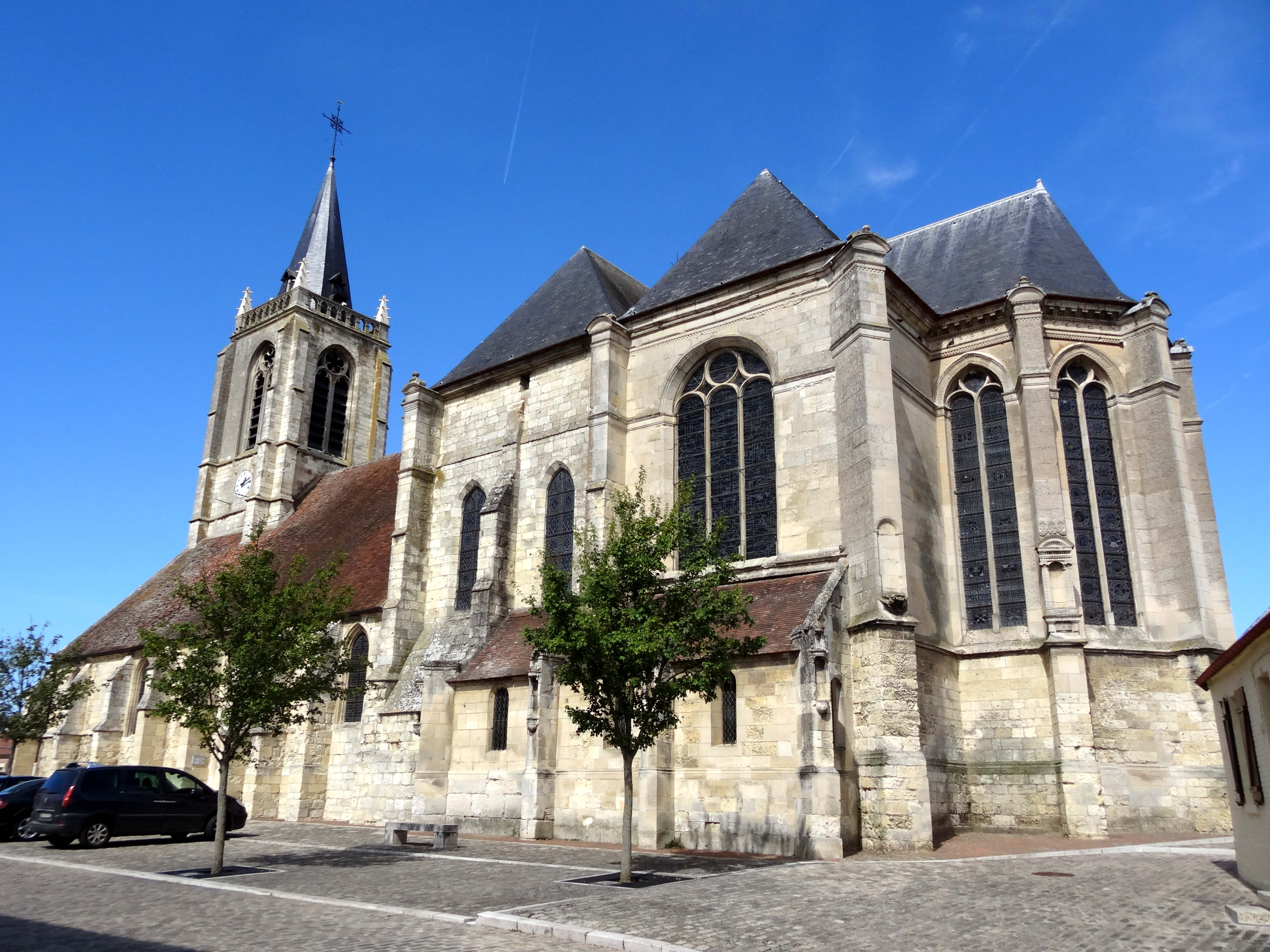 Église Saint-Denis de Remy - voir titre.